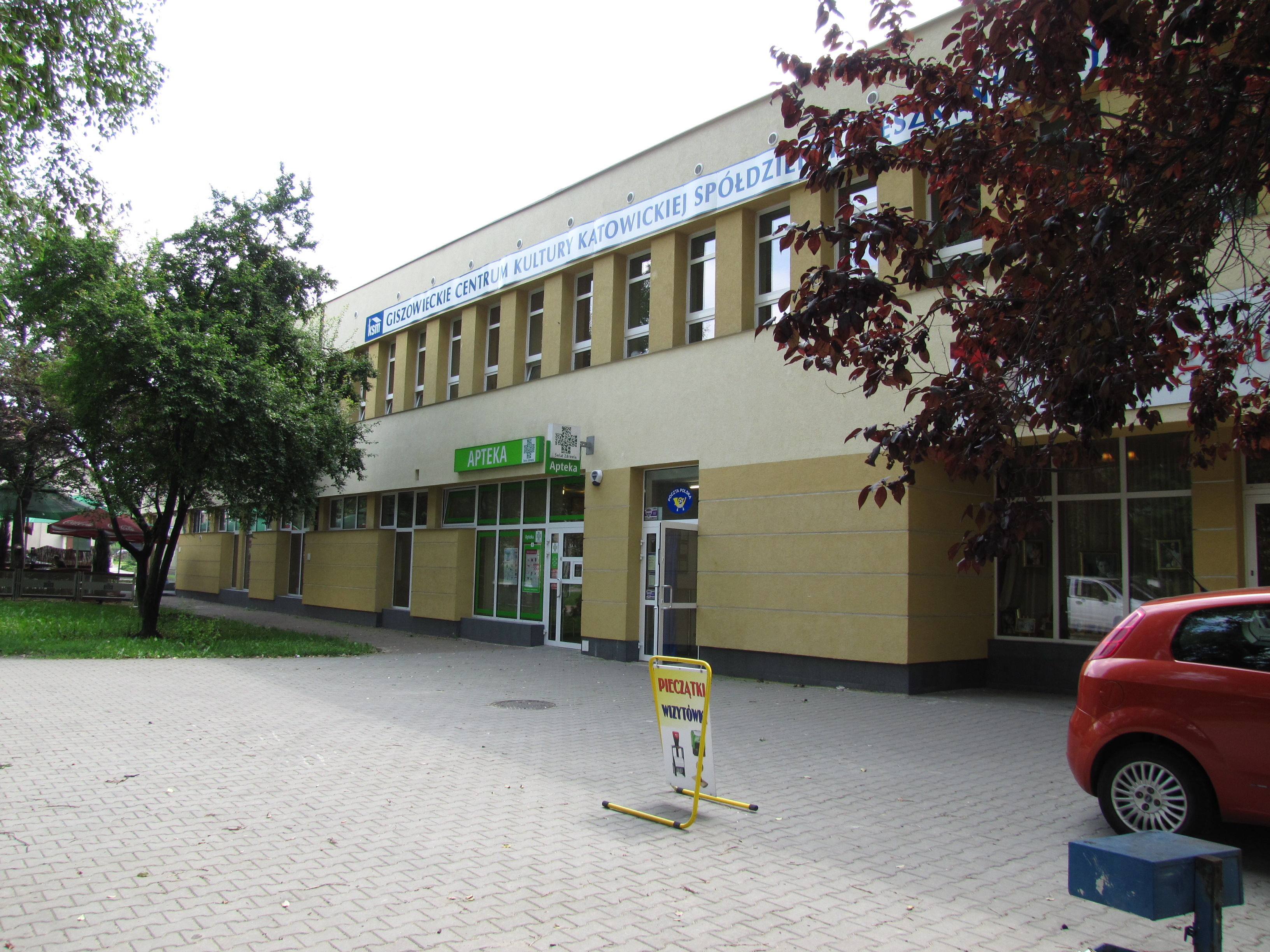 Giszowieckie Centrum Kultury.